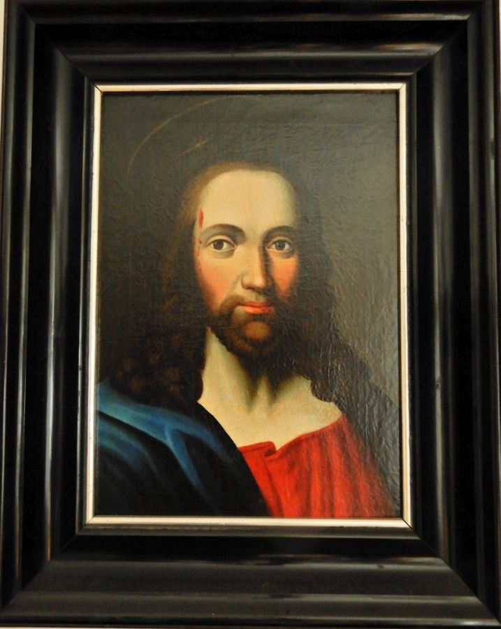 Chrudimský Salvátor (varianta), olejomalba Brno kolem 1820